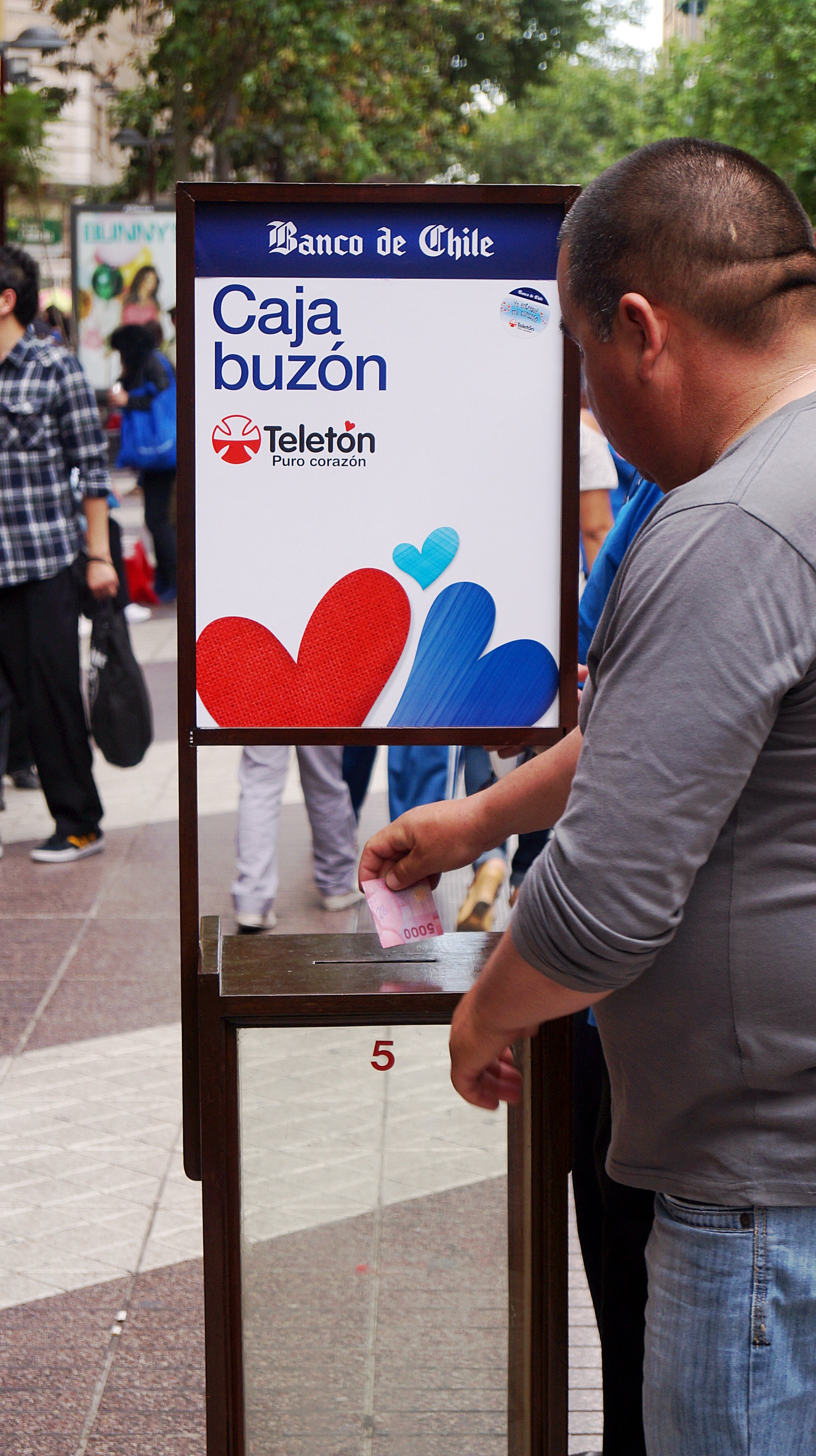 Buzón del Paseo Ahumada para la Teletón 2012 en Chile